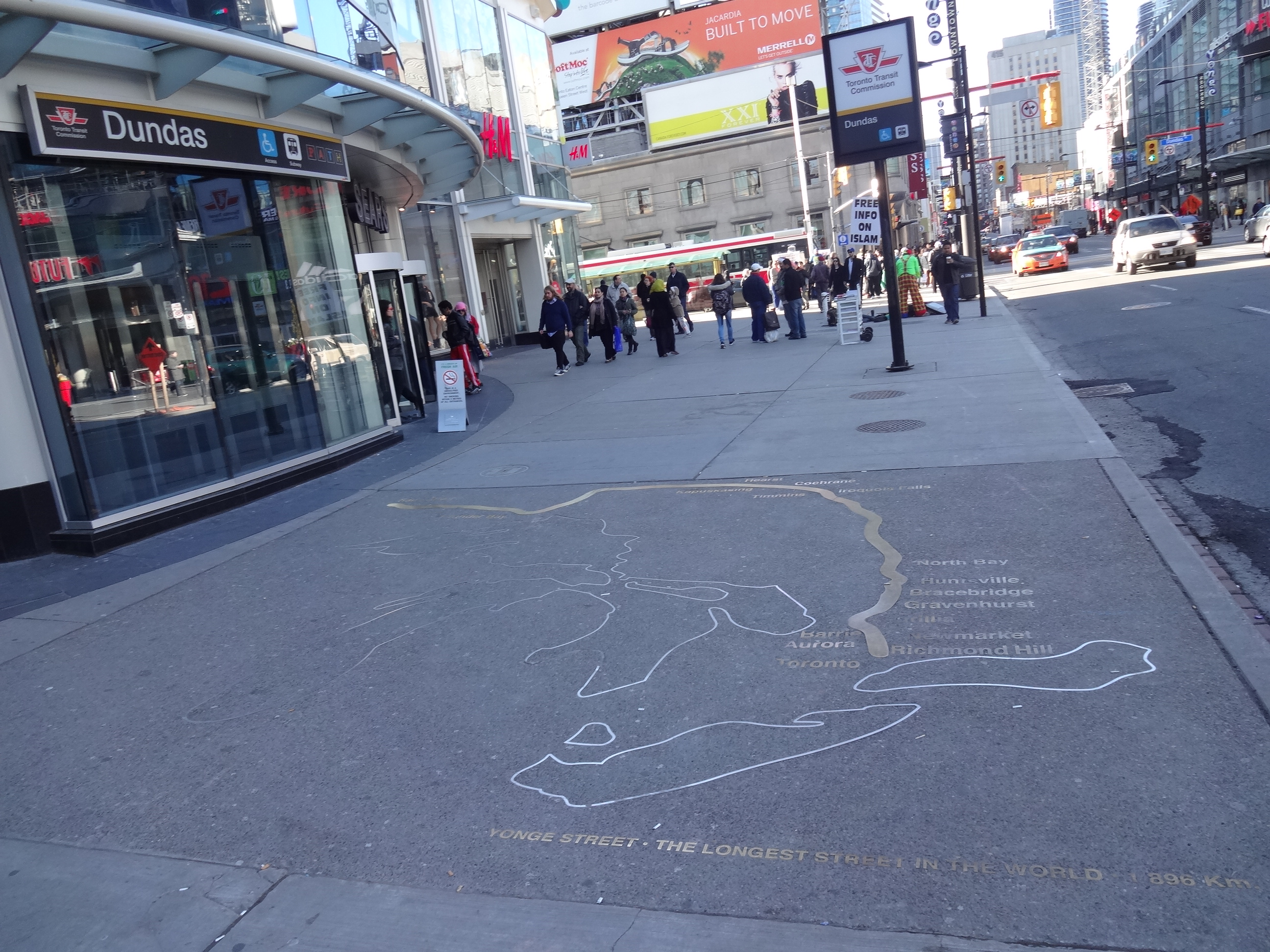 Inscrição sobre a Yonge Street na Dundas Square.